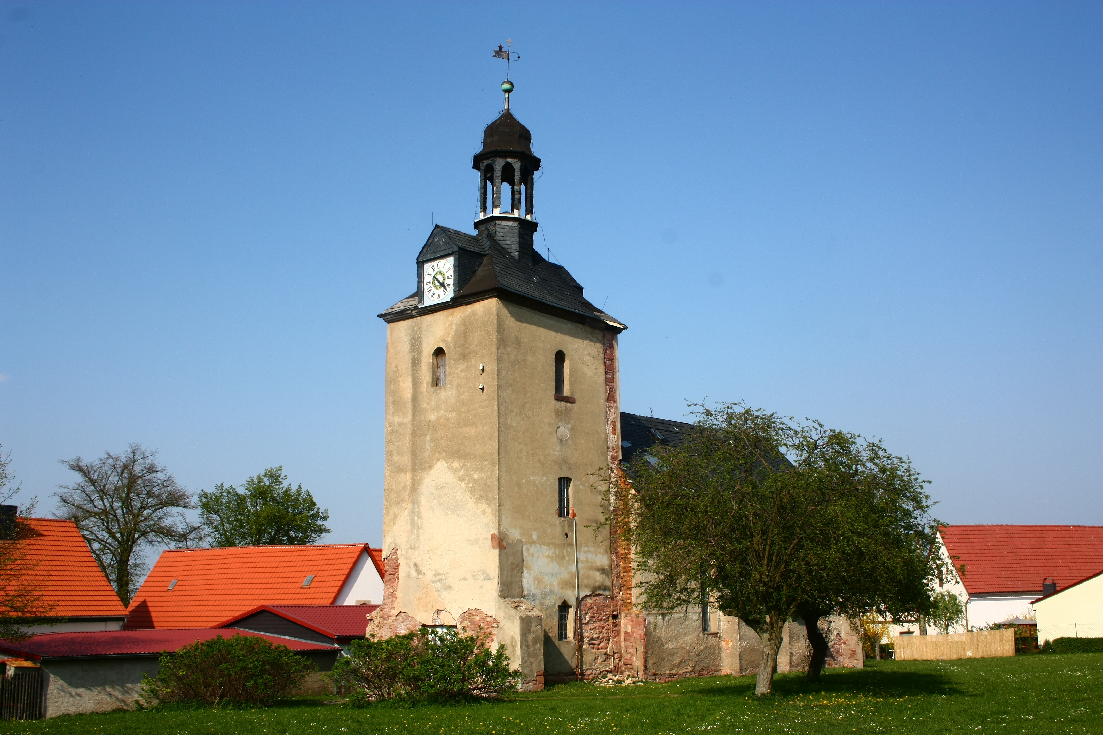 die Dorkirche von Gorenzen